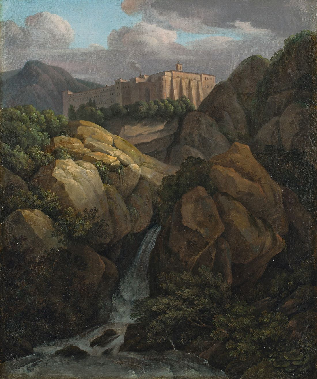 Kloster Santa Scolastica bei Subiaco. Öl auf Leinwand. 47,5 x 39,5 cm